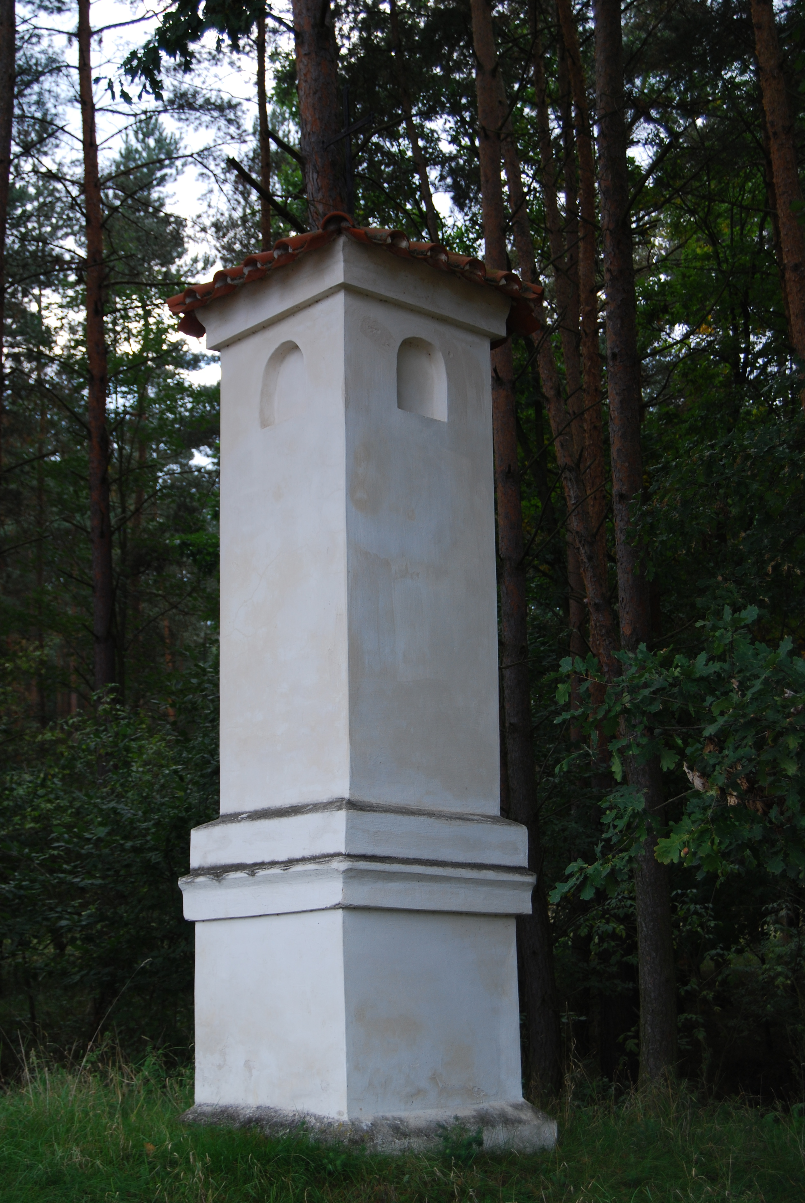 Boží muka v lese, nad železniční přejezdem. Dolní Nerestce je část obce Nerestce v okrese Písek. Česká republika.